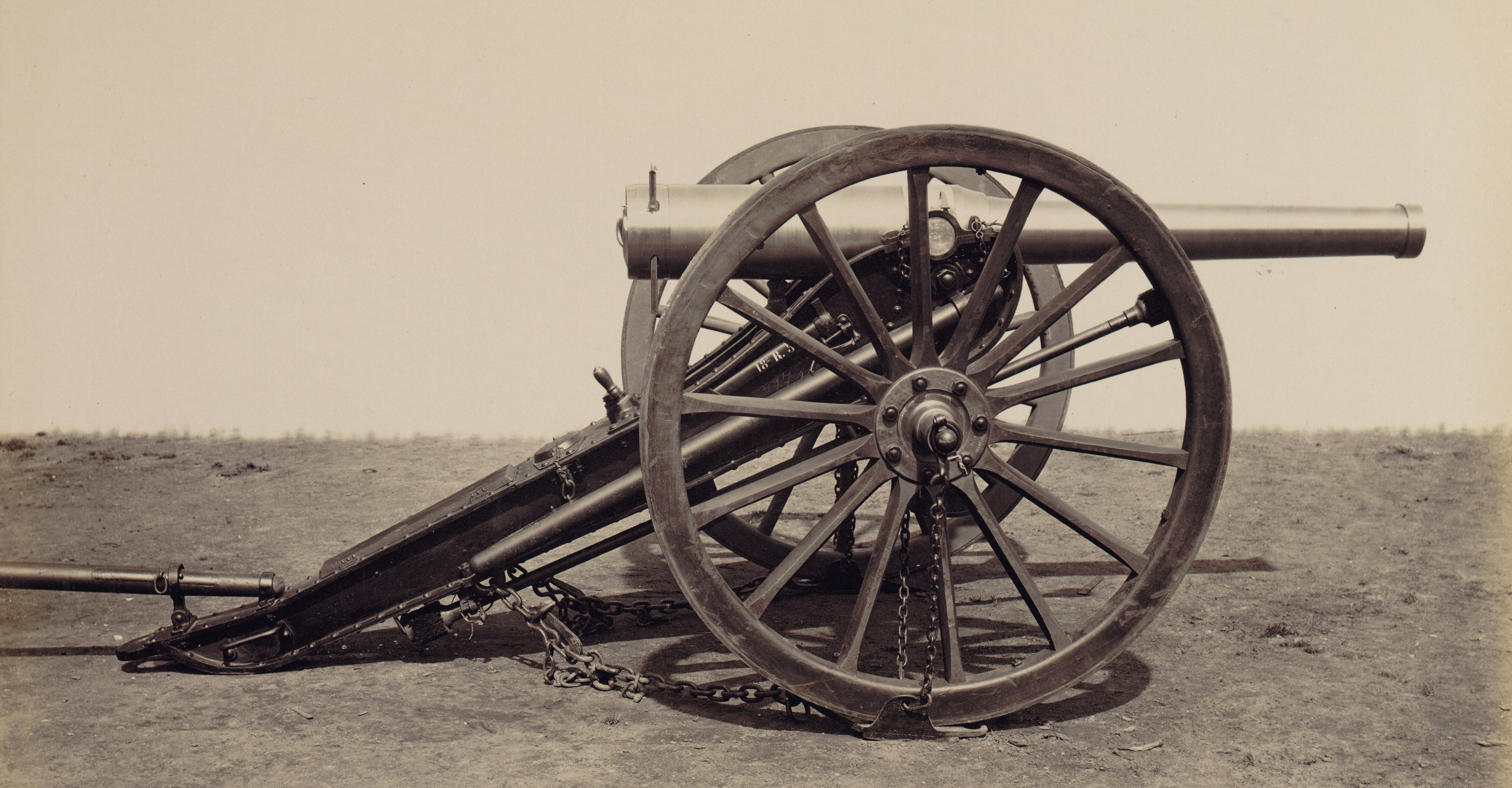 Matériel de l'artillerie et des équipages militaires : canon de 90 en acier sur affût en fer.